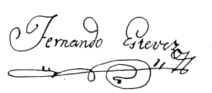 Firma del escultor Fernando Estévez (1788-1854)